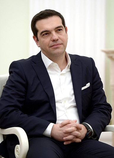 Премьер-министр Греческой Республики Алексис Ципрас в Москве